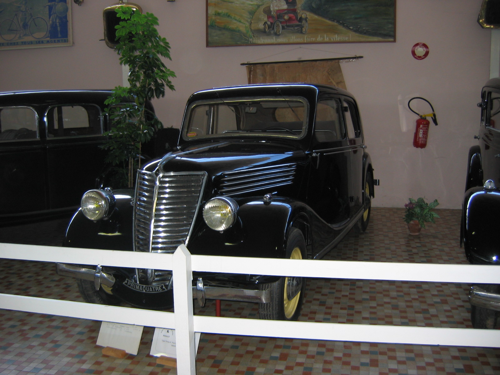 Renault Primaquatre Picture Gérard Delafond